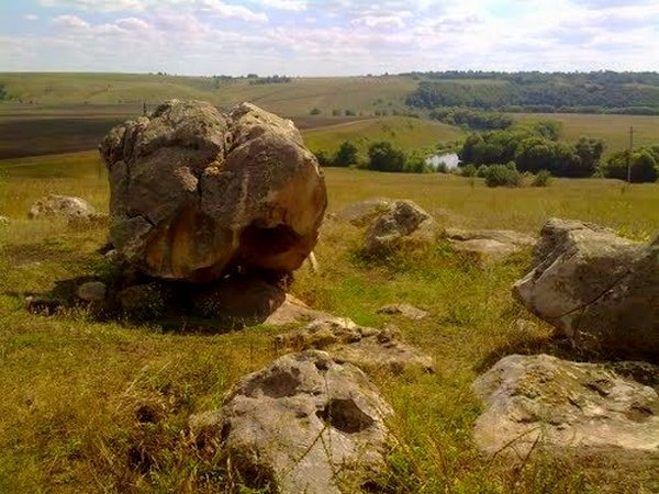 На реке Красивая меча возле небольшого села Козье